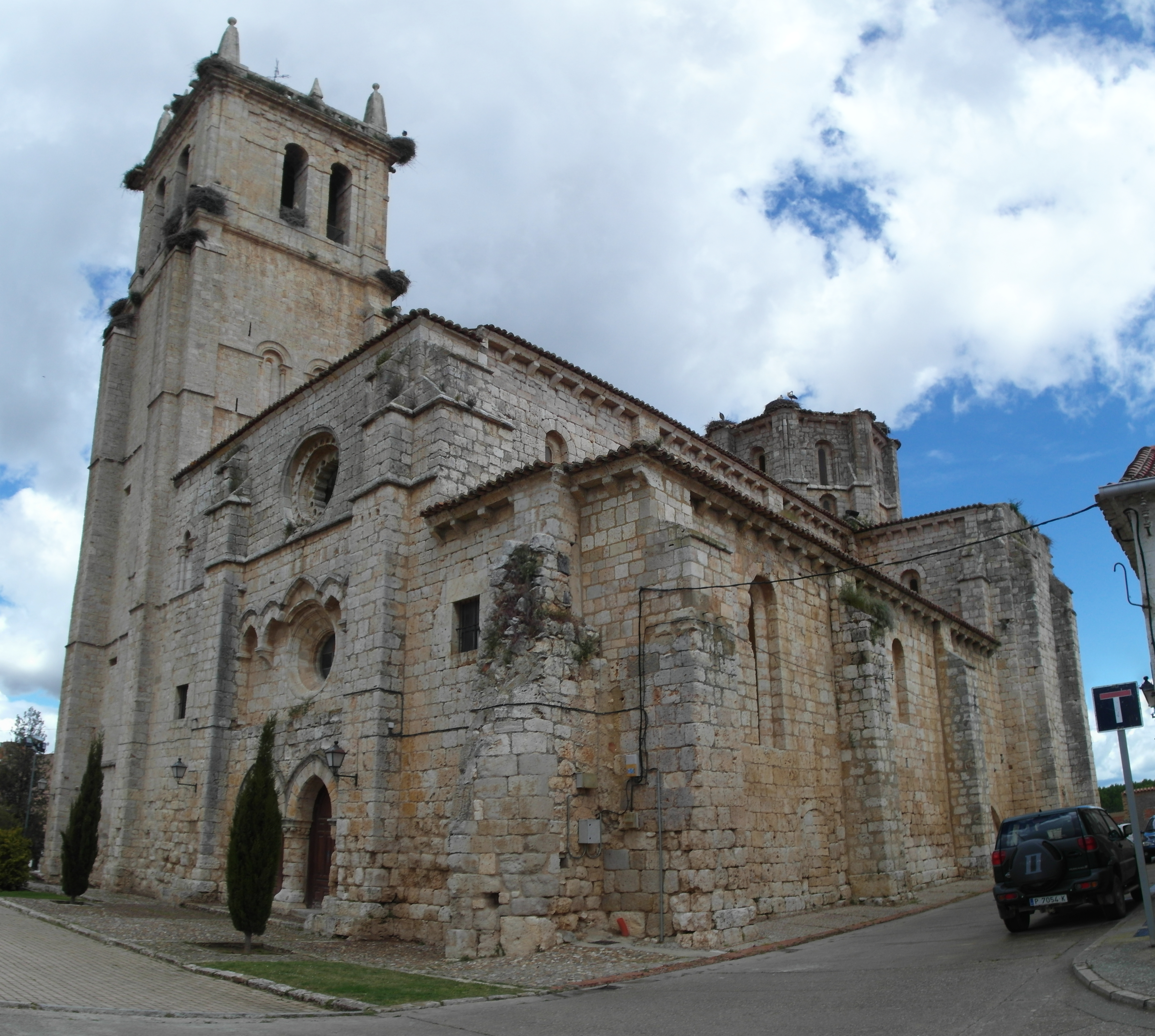 Villamuriel de Cerrato, Palencia.